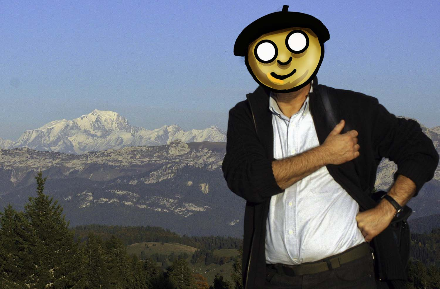 Morburre.